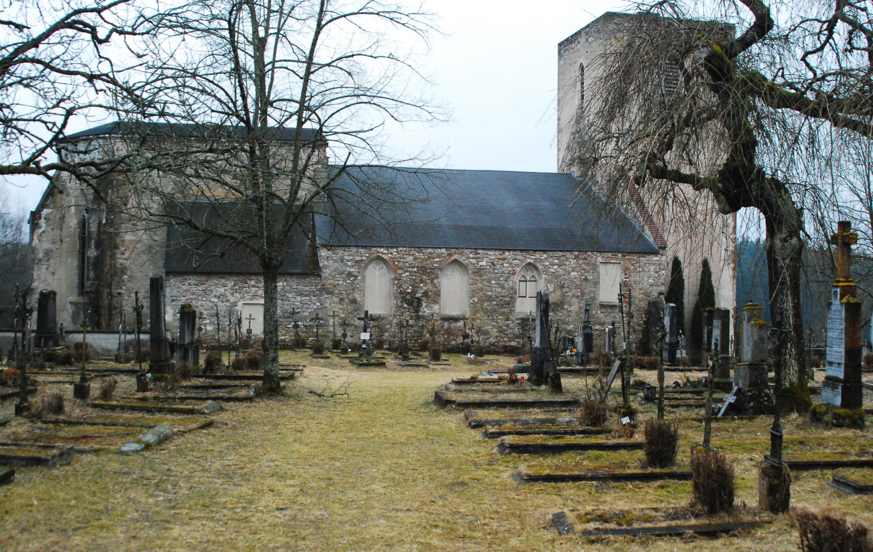 Kirche und Friedhof von Döllersheim auf dem Areal des Truppenübungsplatzes Allentsteig in Niederösterreich